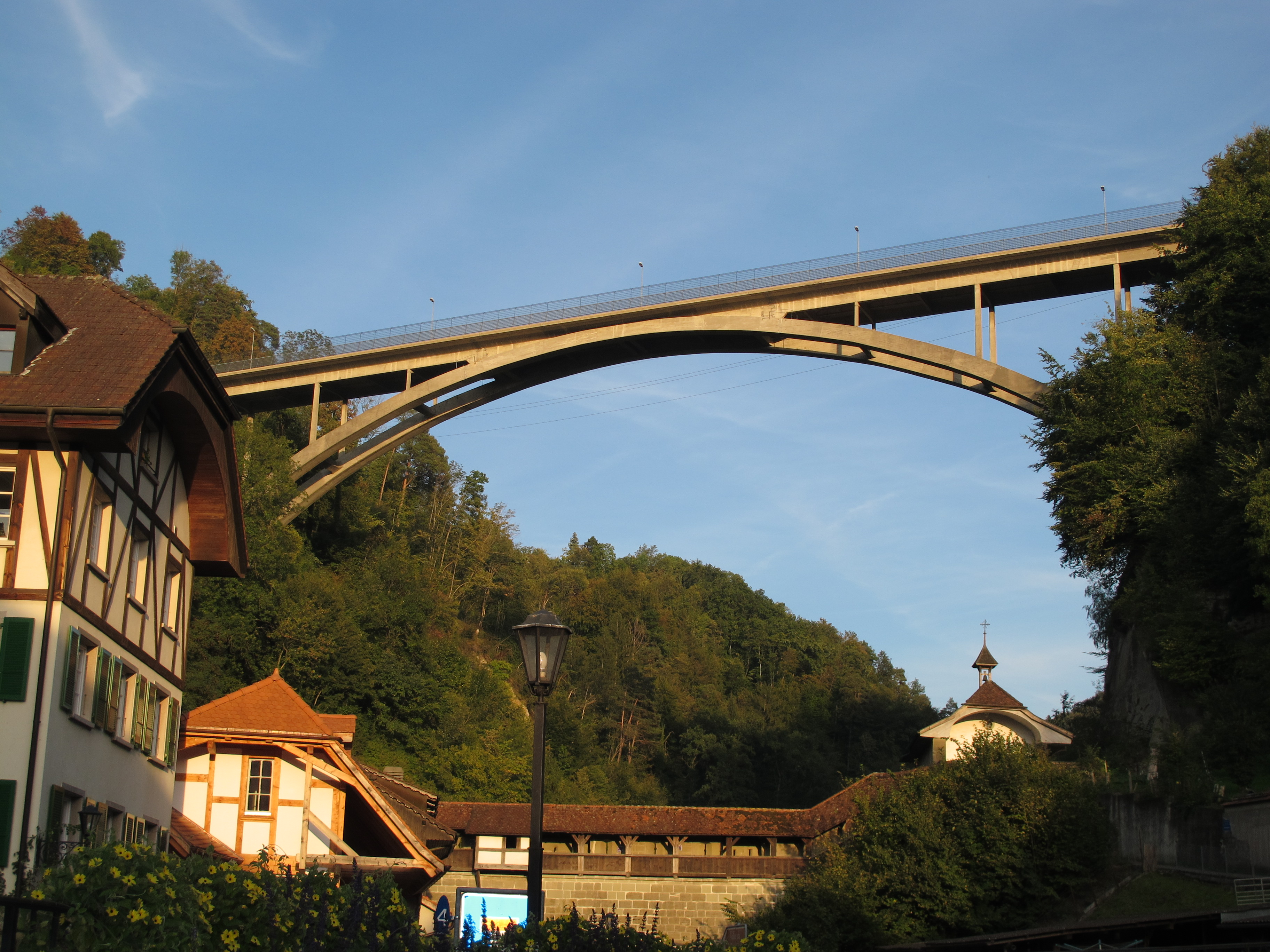 Pont du Gottéron - Fribourg